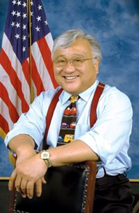 Mike Honda, U.S. Congressman.